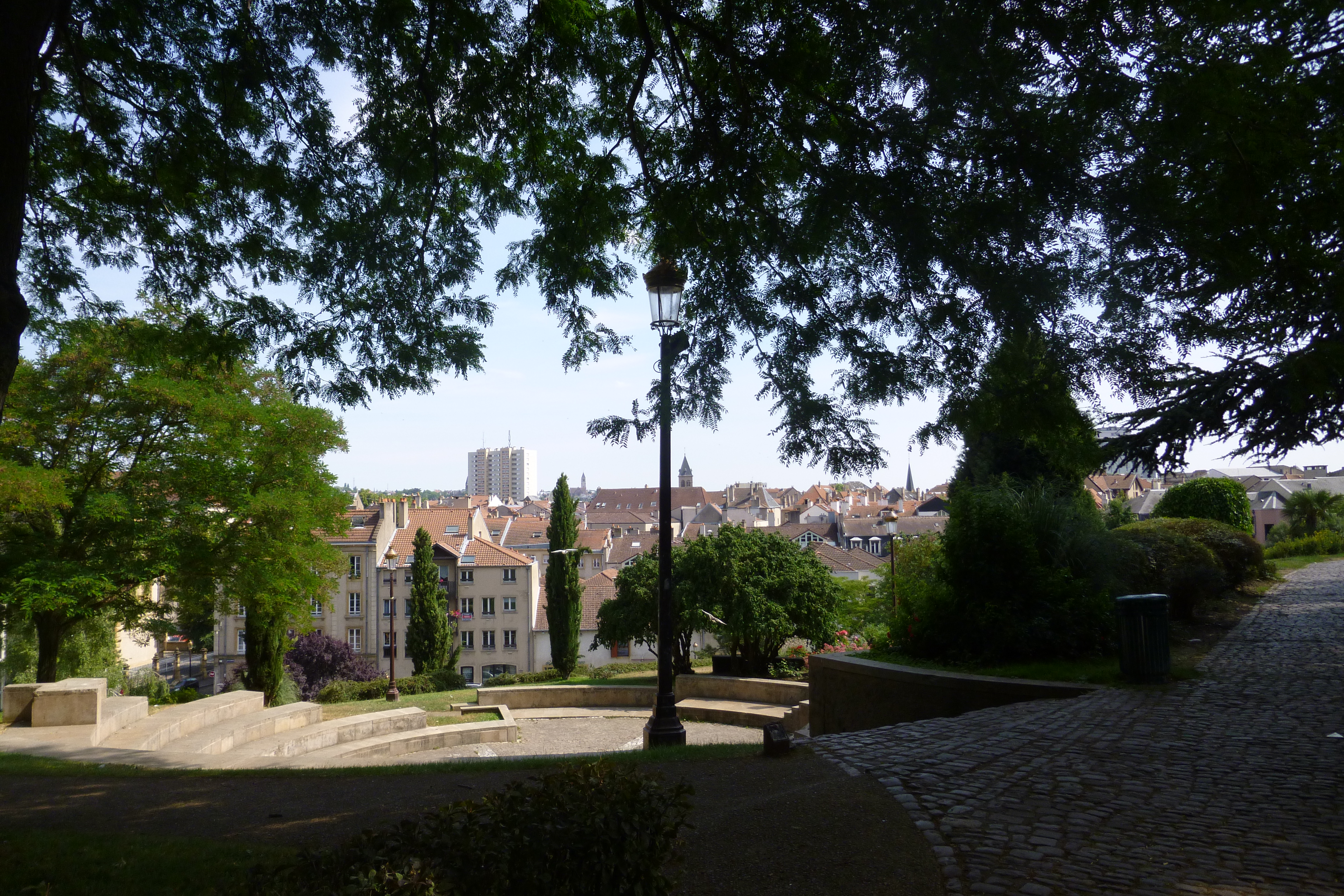 Le jardin des Tanneurs de Metz avec son amphithéâtre aérien et vue panoramique sur le quartier Outre-Seille de la vieille-ville.